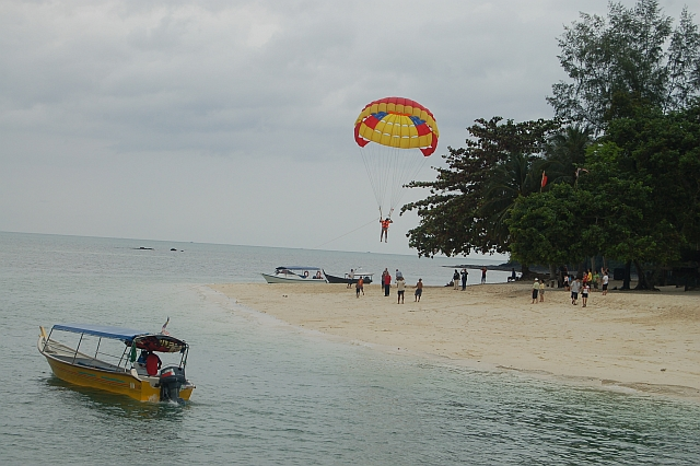 Paracut di pulau Beras Basah